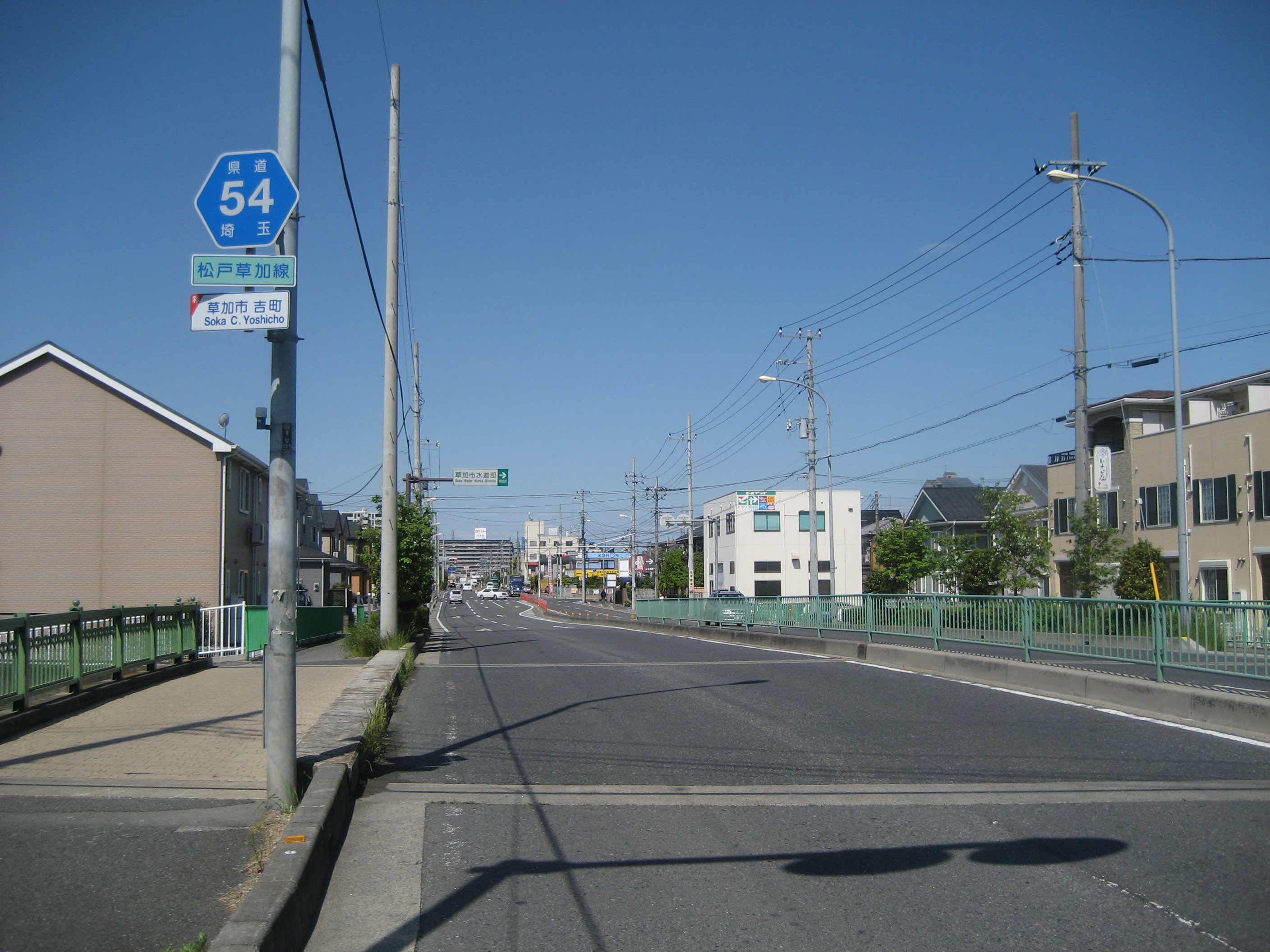 埼玉県道54号線草加市吉町付近（草加市街方面を撮影）